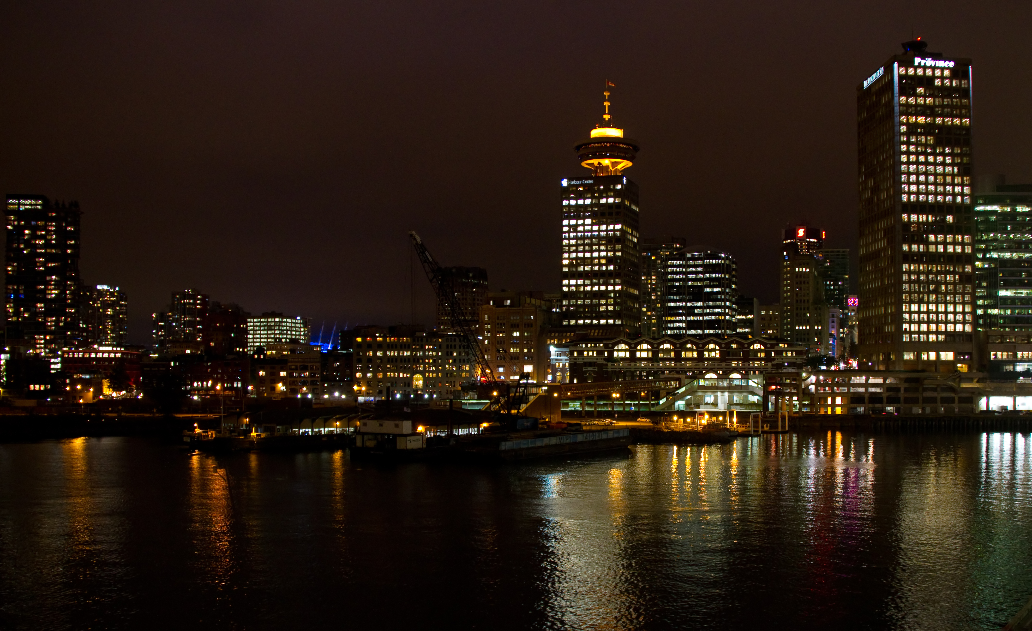 Vancouver night 1